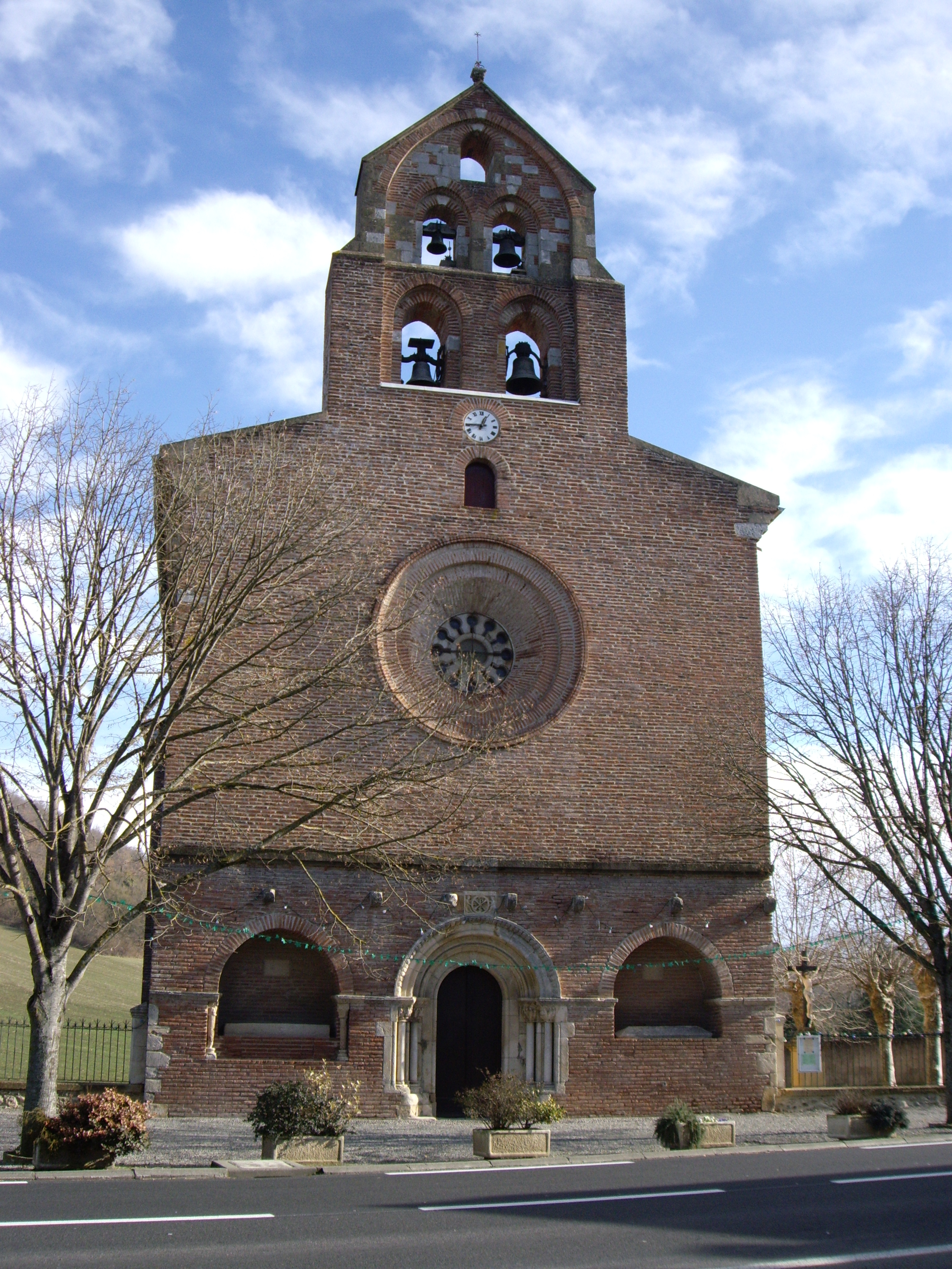 Église des Templiers de Montsaunès (Haute-Garonne, France).